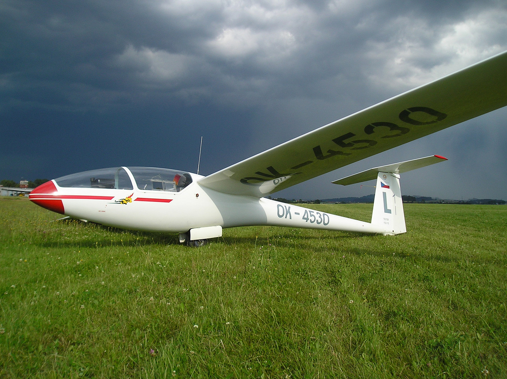 Vosa VSO-10 Aeroklubu Praha Let%u0148any - airfield Havlí%u010Dk%u016Fv Brod